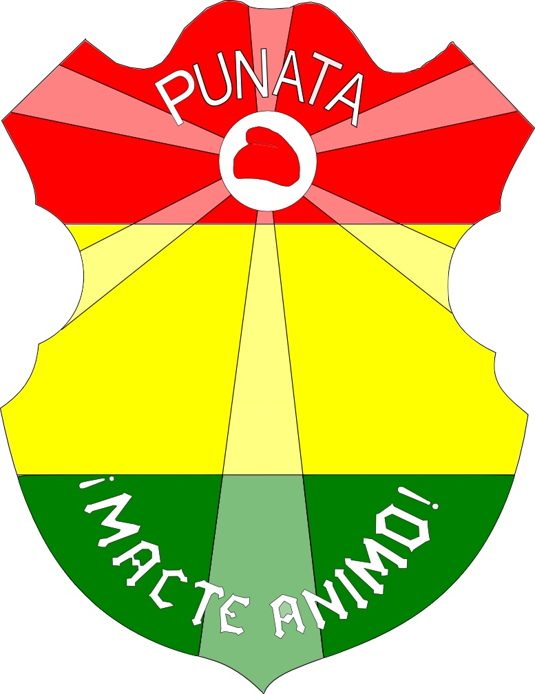 Escudo de la Provincia Punata en el Departamento de Cochabamba, Bolivia